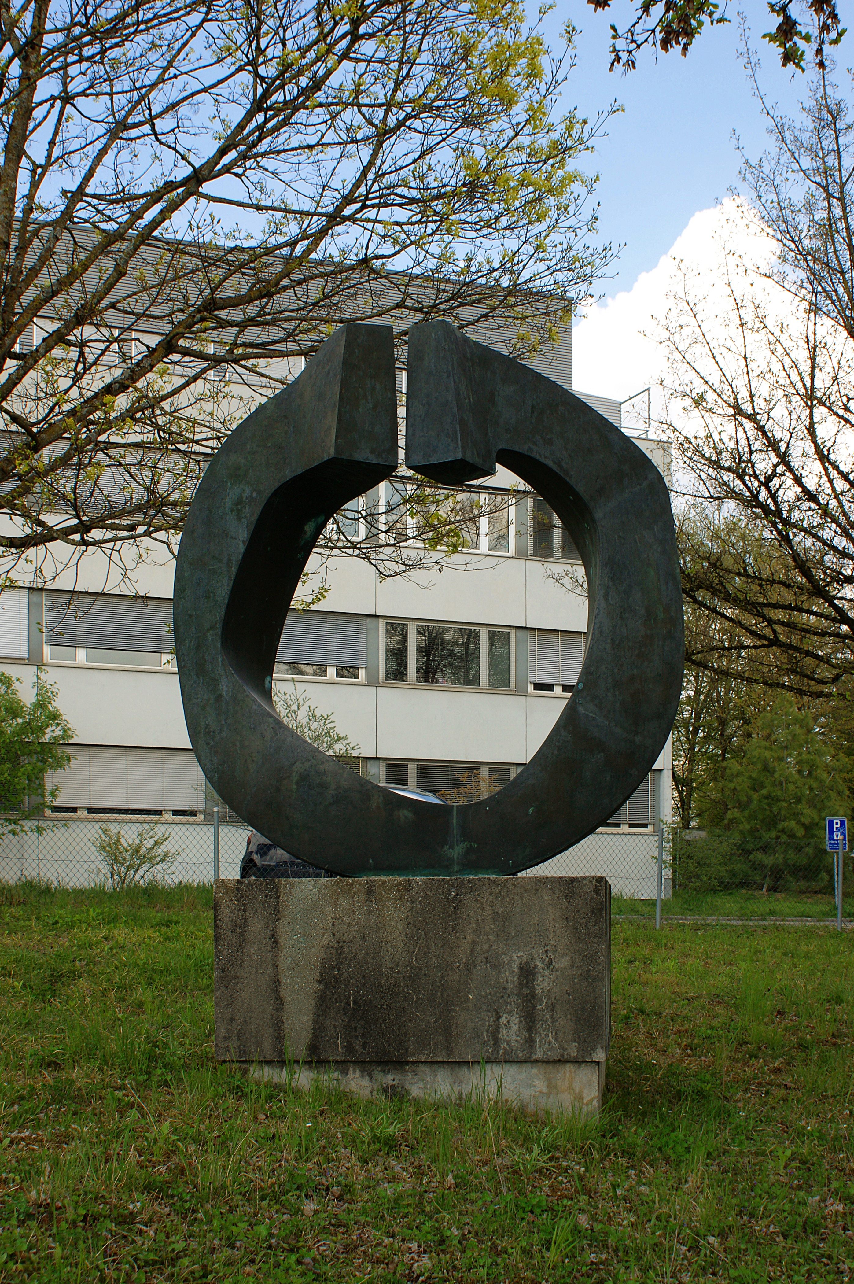 Bronzeplastik Grand Astre 1⁄3 (André Ramseyer 1966) mit Gebäude Länggassstrasse 122 im Hintergrund